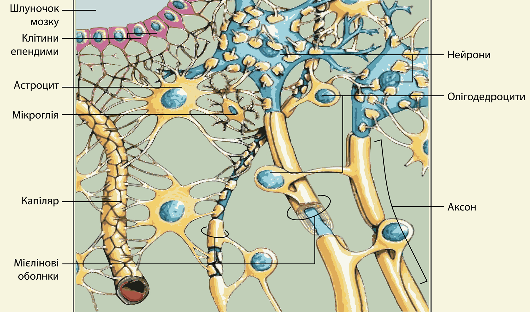 Клітини головного мозку